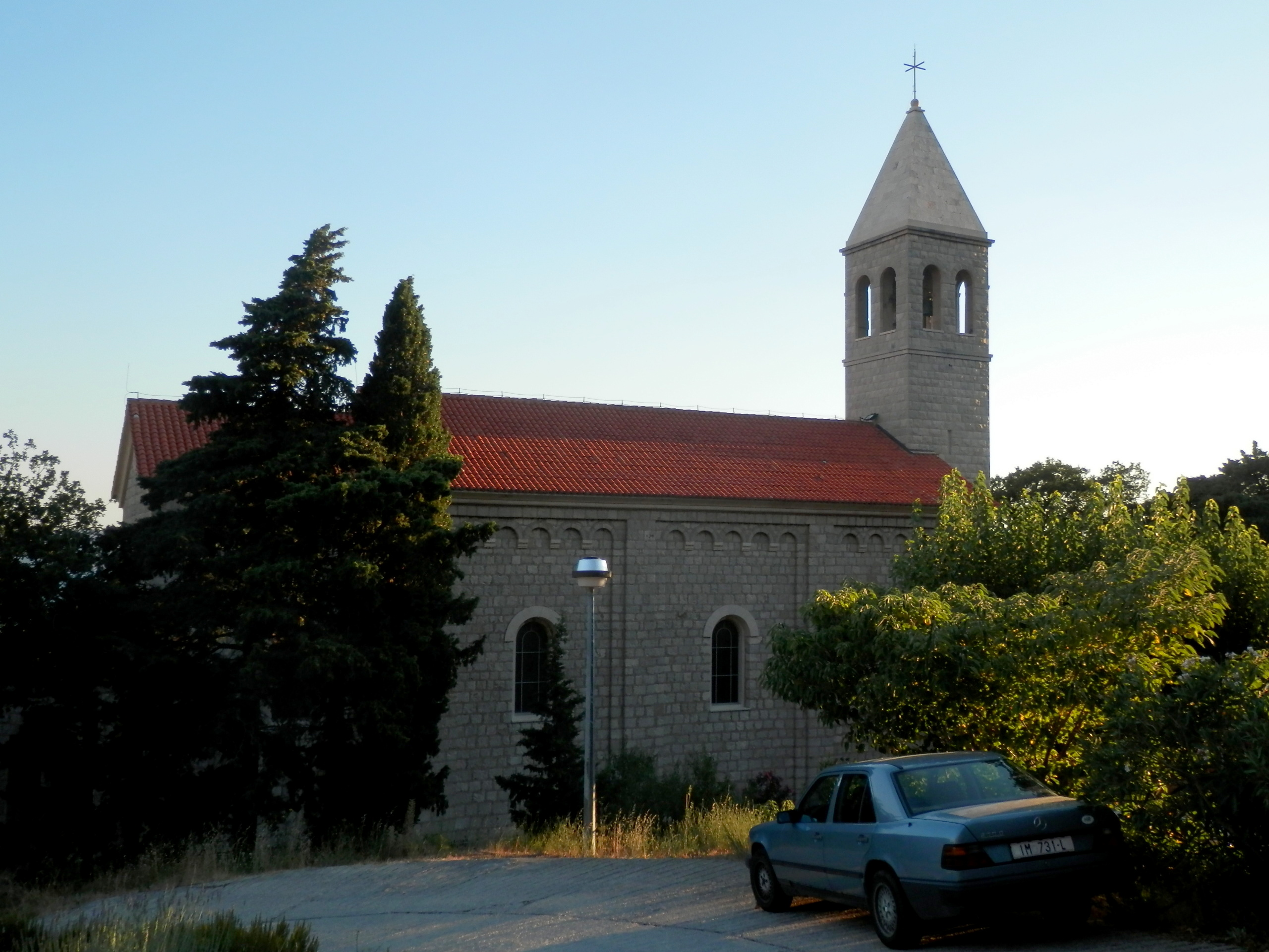 Church St. Stephen (Brela),Kostol sv.Stjepan, založený v roku 1897, Brela.- Zeliti. Dalmácia, Chorvátsko.Leto 2013.